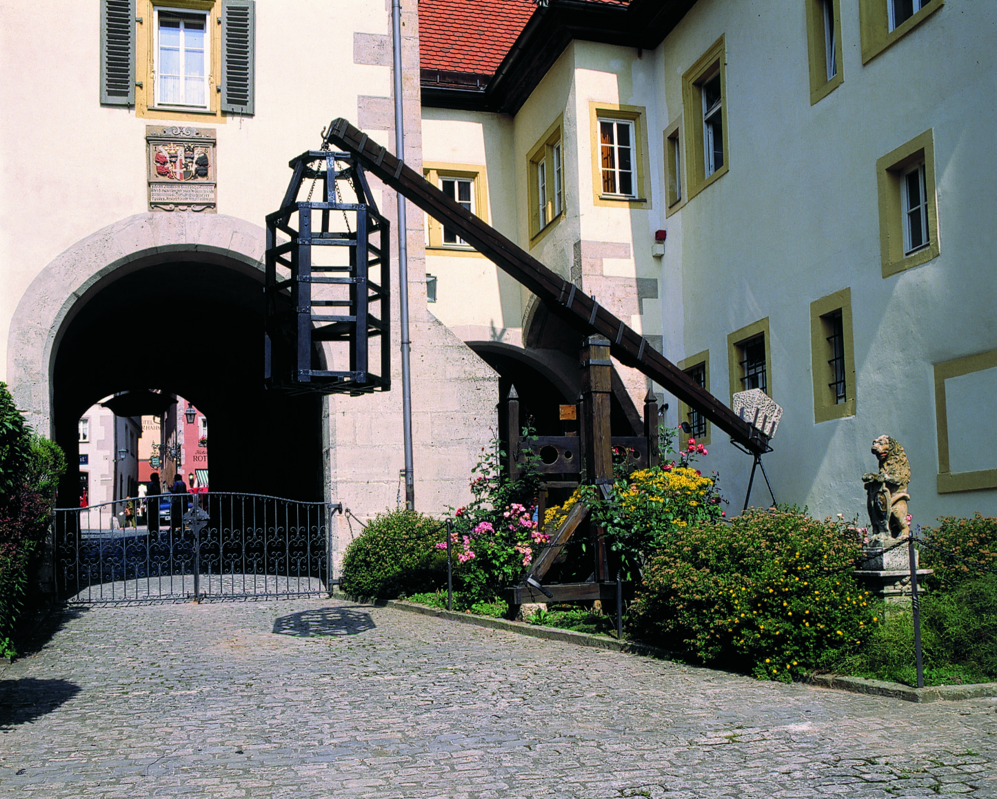 Schandkorb im Eingangsbereich